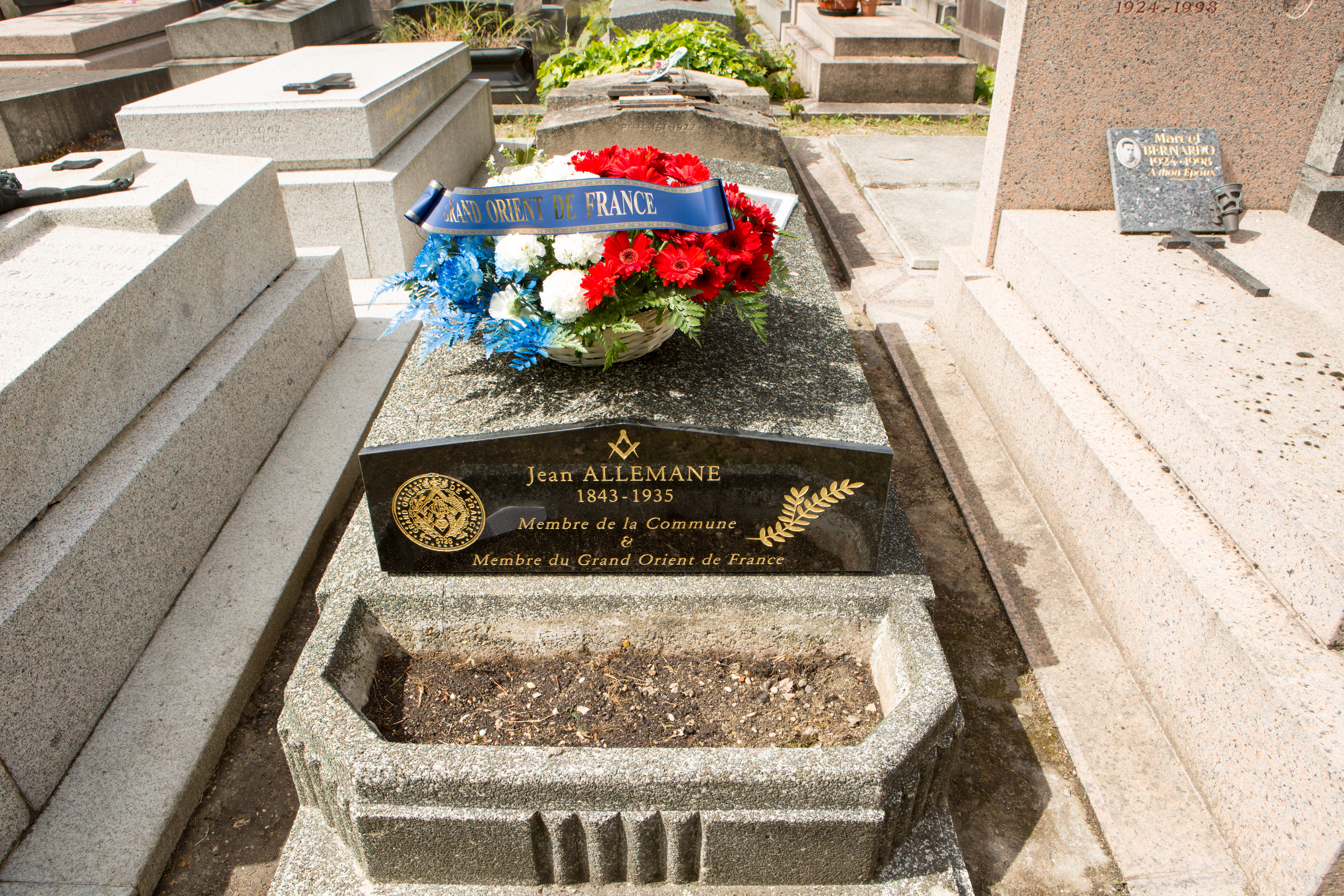 Sépulture de Jean Allemane (1843-1935), typographe, syndicaliste et homme politique socialiste français.